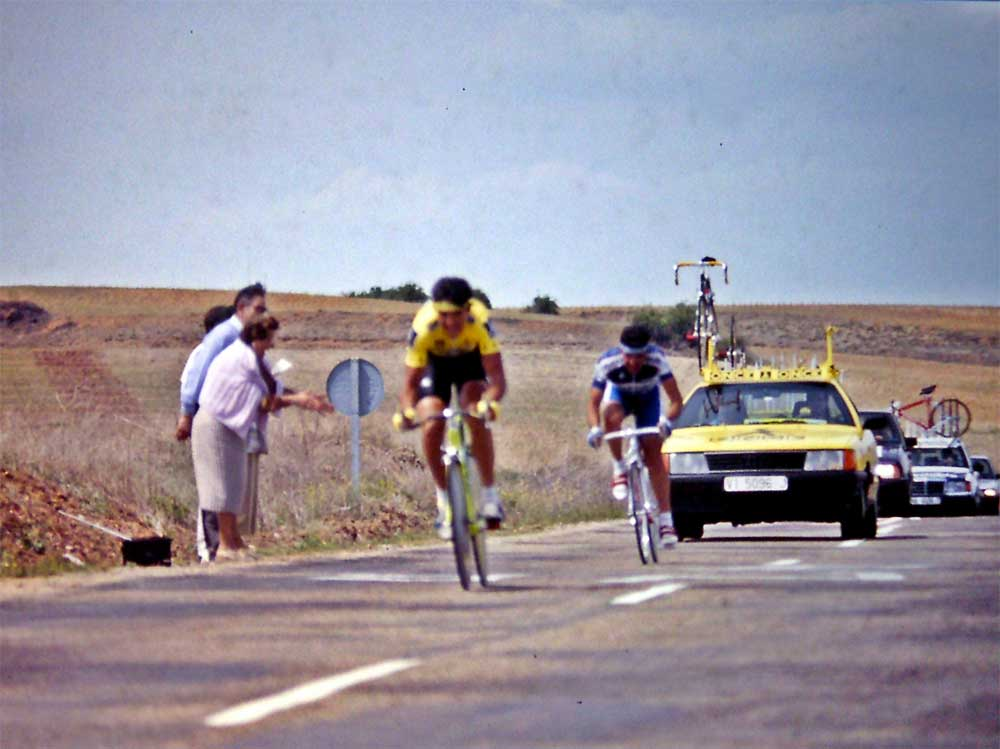 Perico Delgado dobla a su contrincante en la contrarreloj Valladolid-Medina del Campo, en la Vuelta Ciclista a España de 1989